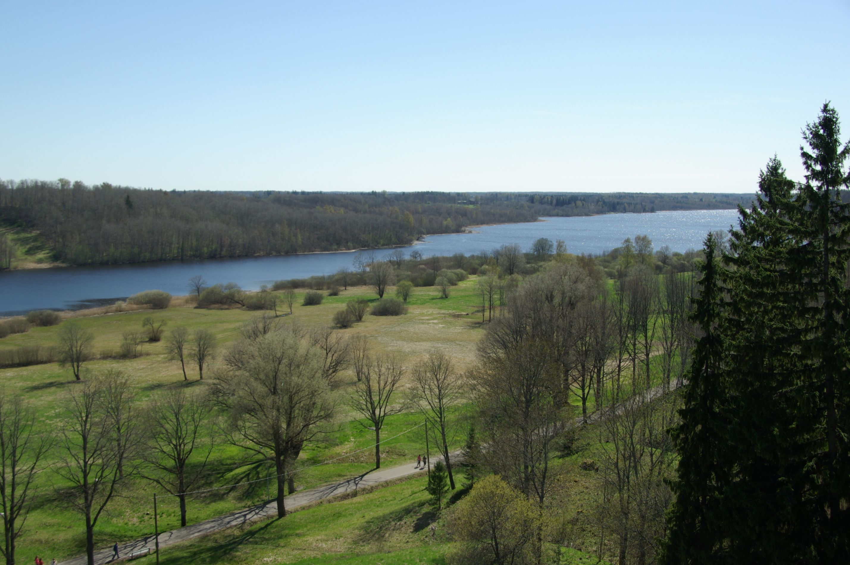 Viljandi linnast vahetult kagu pool olev kirde-edela suunas piklik orujärv. Asetseb Sakala kõrgustiku keskosa läbivas ürgorus, meretasemest 41,9 m kõrgemal. Ta pikkus on 4,6 km, laius 0,45 km, pindala 155 ha, suurim sügavus 11,0 m (keskmine sügavus 5,6 m). Kõige sügavam koht on järve kitsast osast (nn. Järvekaelast) edela pool. Järve kirdeosa nimetatakse Viiratsi otsaks, edelaosa Orika otsaks. Teine sügav koht on Viiratsi otsas Mädalepiku kohal.